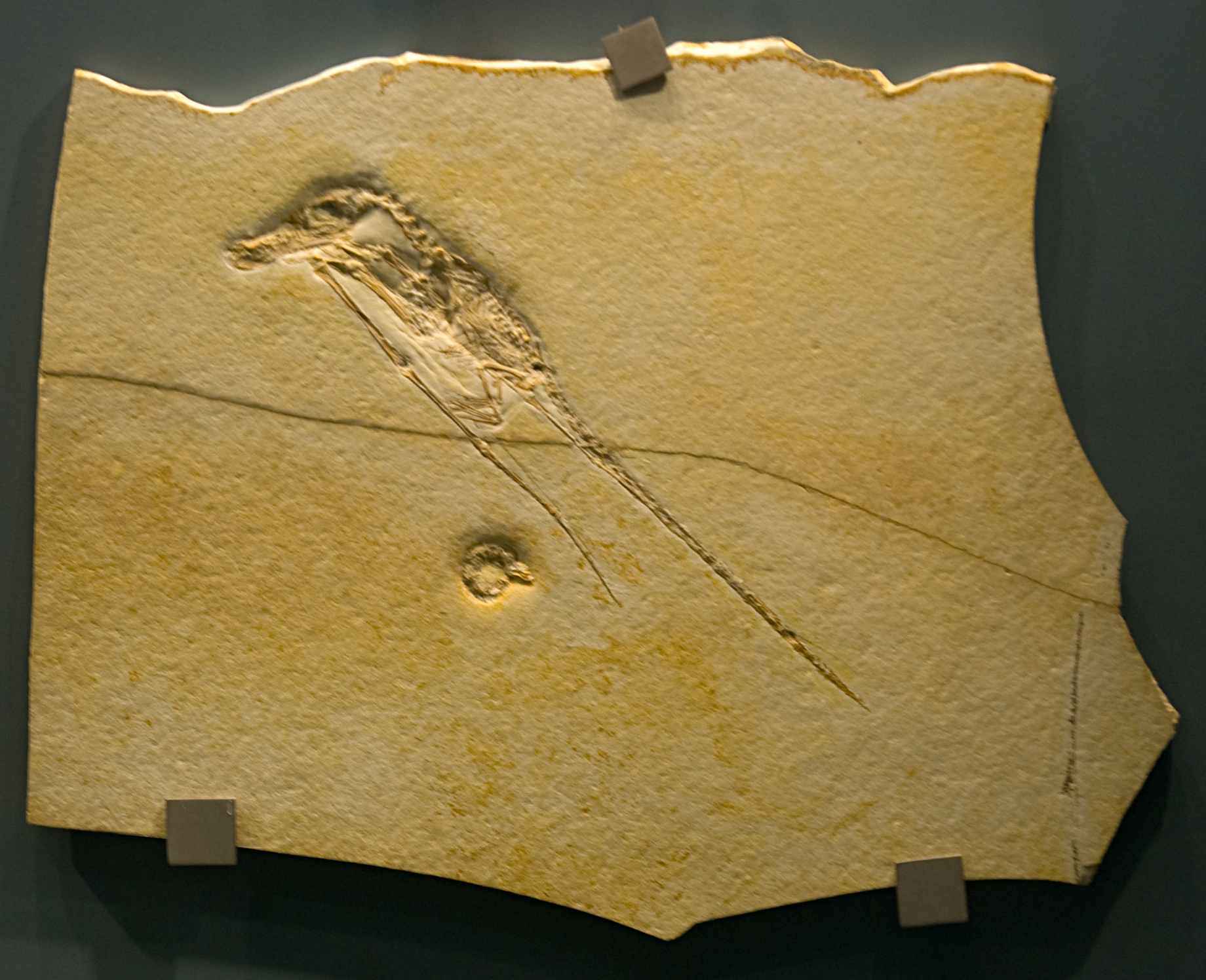 Jura Museum - Eichstatt, Rhamphorhynchus intermedius, (No. 28, Wellnhofer 1975). Jahre alt gefunden in Wintershof (Leihgabe) Langschwanz-Flugsaurier mit einem halbverdauten Fisch als Mageninhalt. Am Schwanzende ist der Abdruck eines ovalen Schwanzsegels zu erkennen. (Jura Museum - Eichstätt)